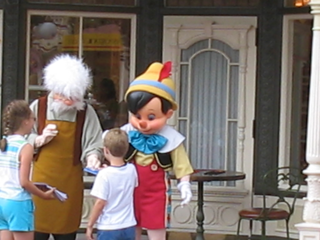 Pinokkio, Magic Kingdom, Orlando. May 2005